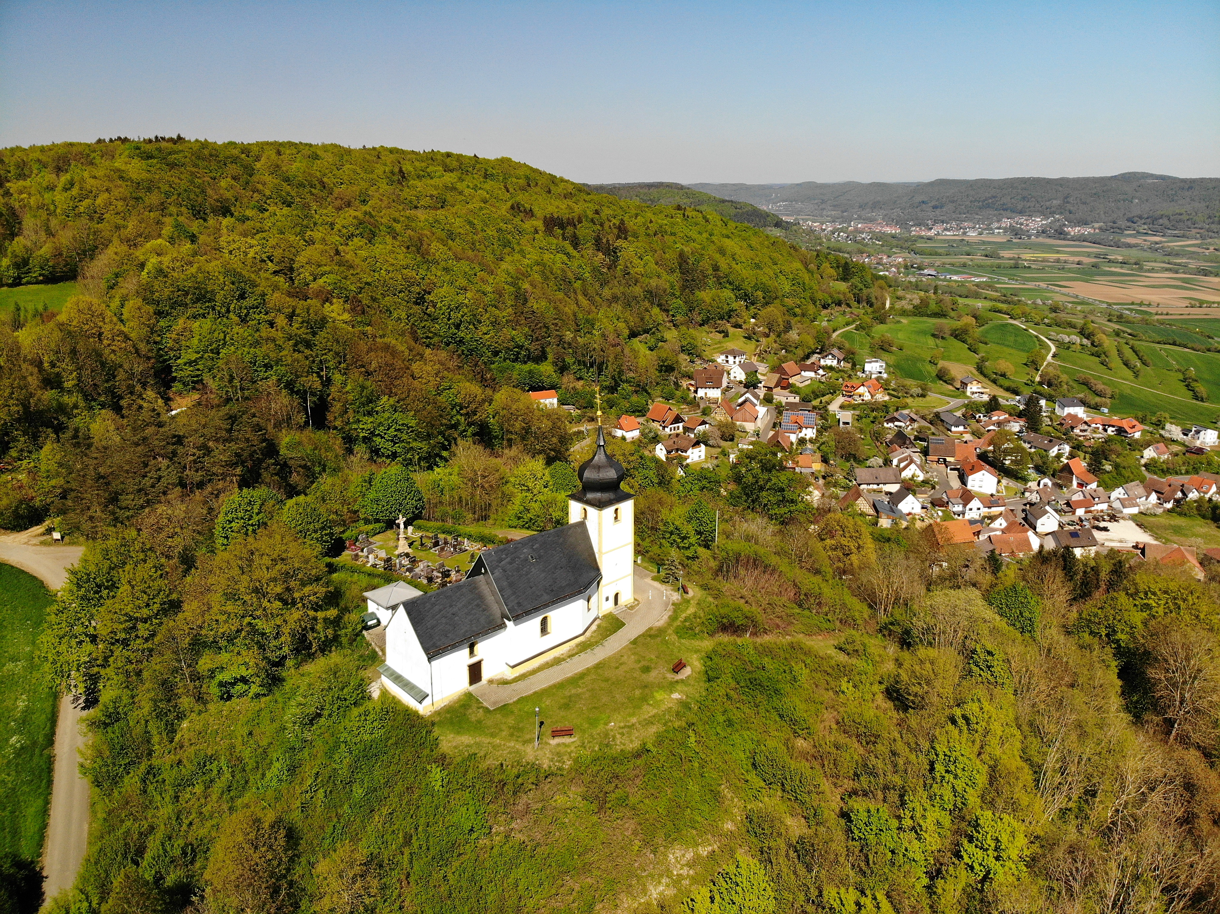 Vexierkapelle St. Nikolaus bei Reifenberg (2020)